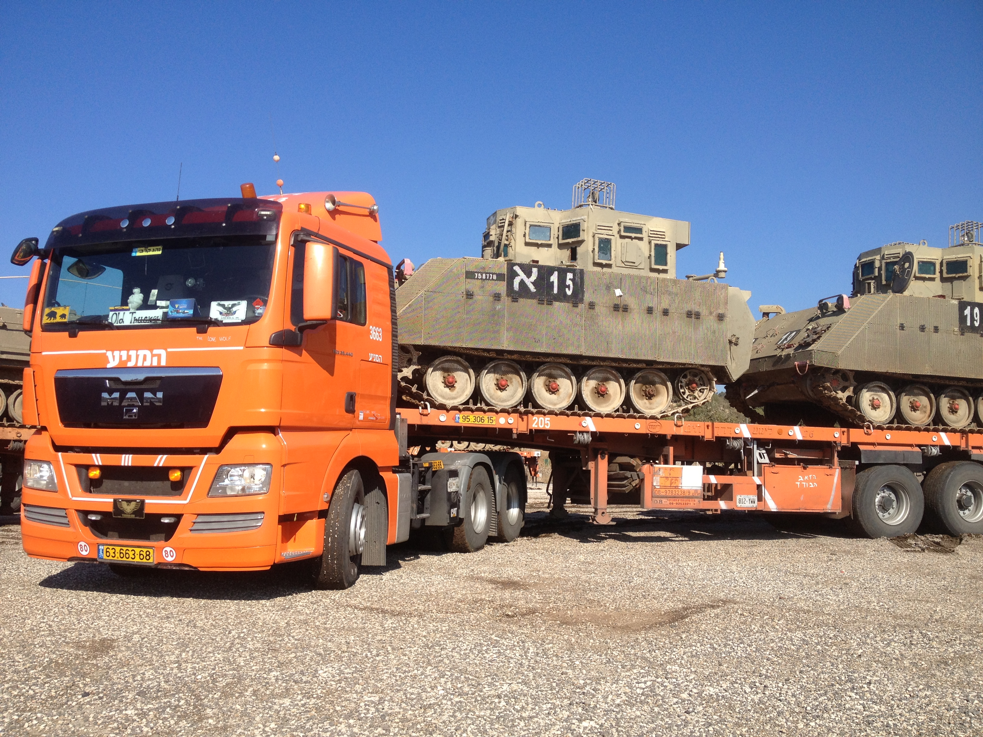 משאיות המניע מובילות נגמ"שים